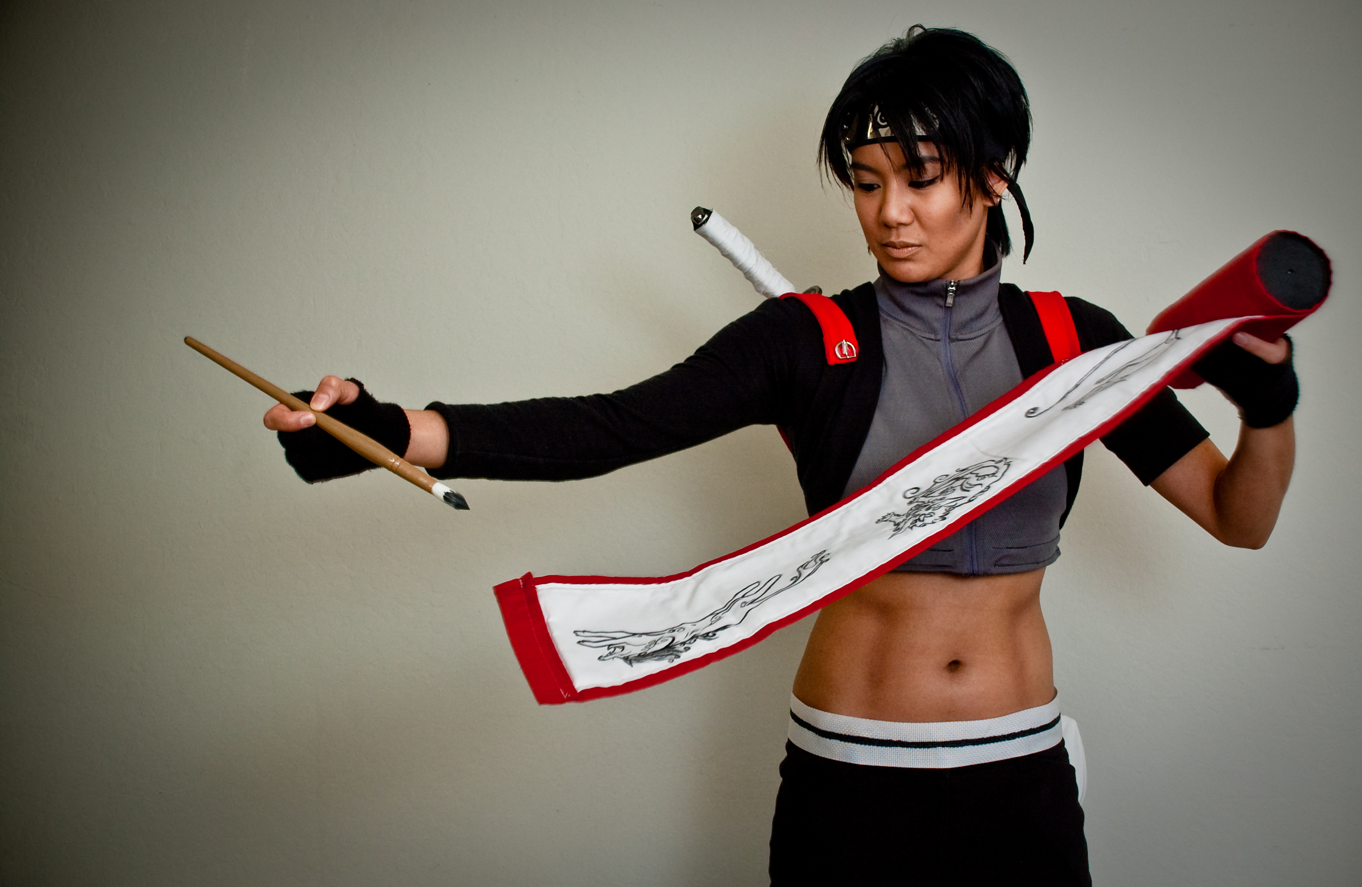 cosplay de saï (naruto)